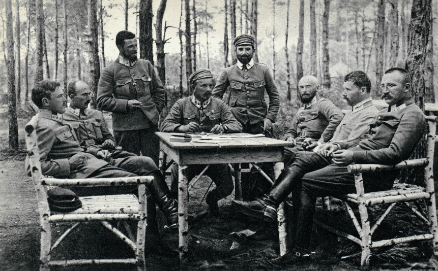 Drugie spotkanie Rady Pułkowników na pozycjach 4 pułku piechoty Legionów Polskich pod Optową.